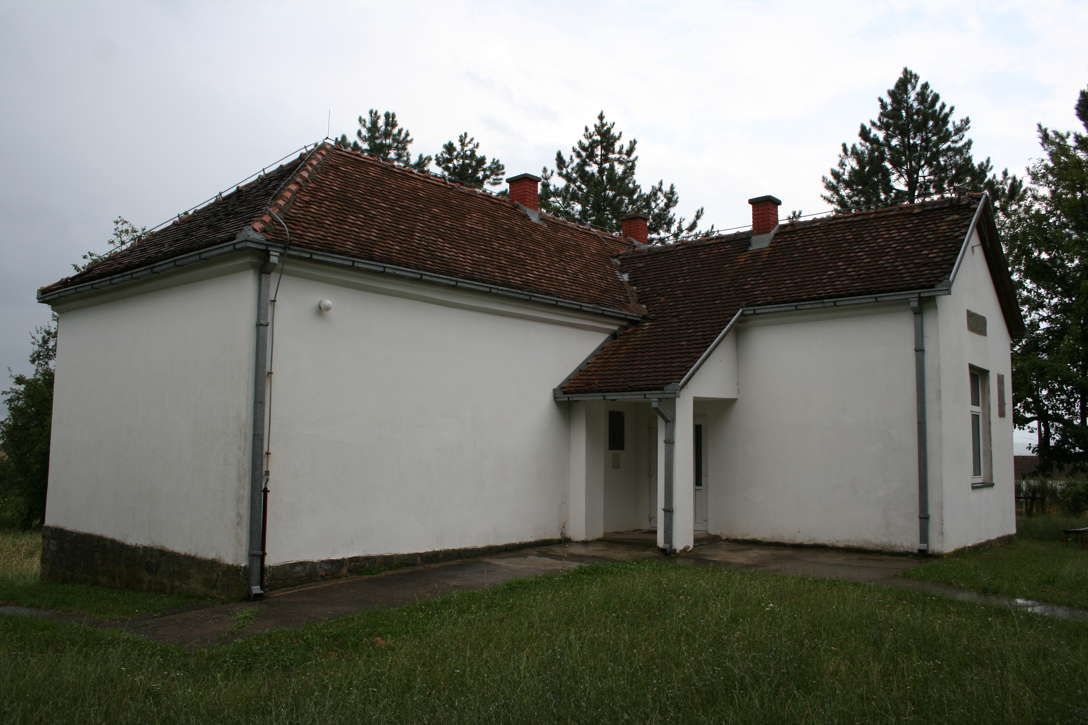 Zgrada škole, Mali Bošnjak